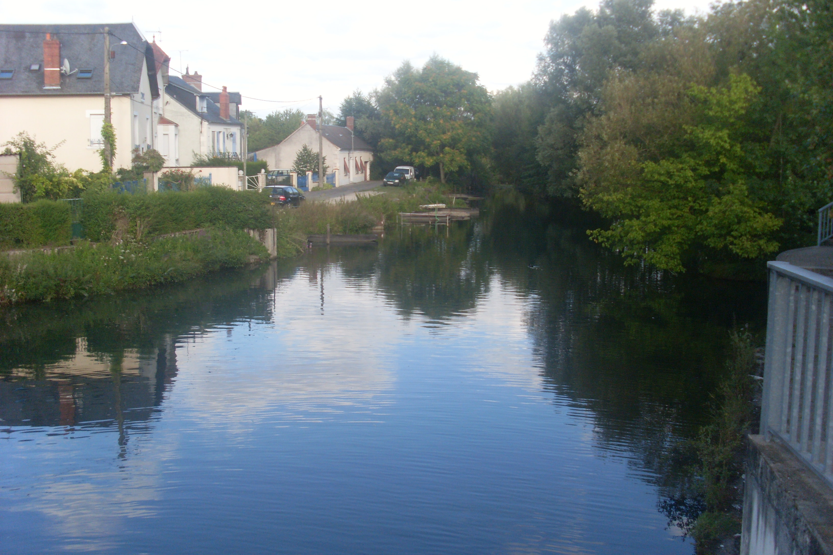 La Voiselle à Bourges